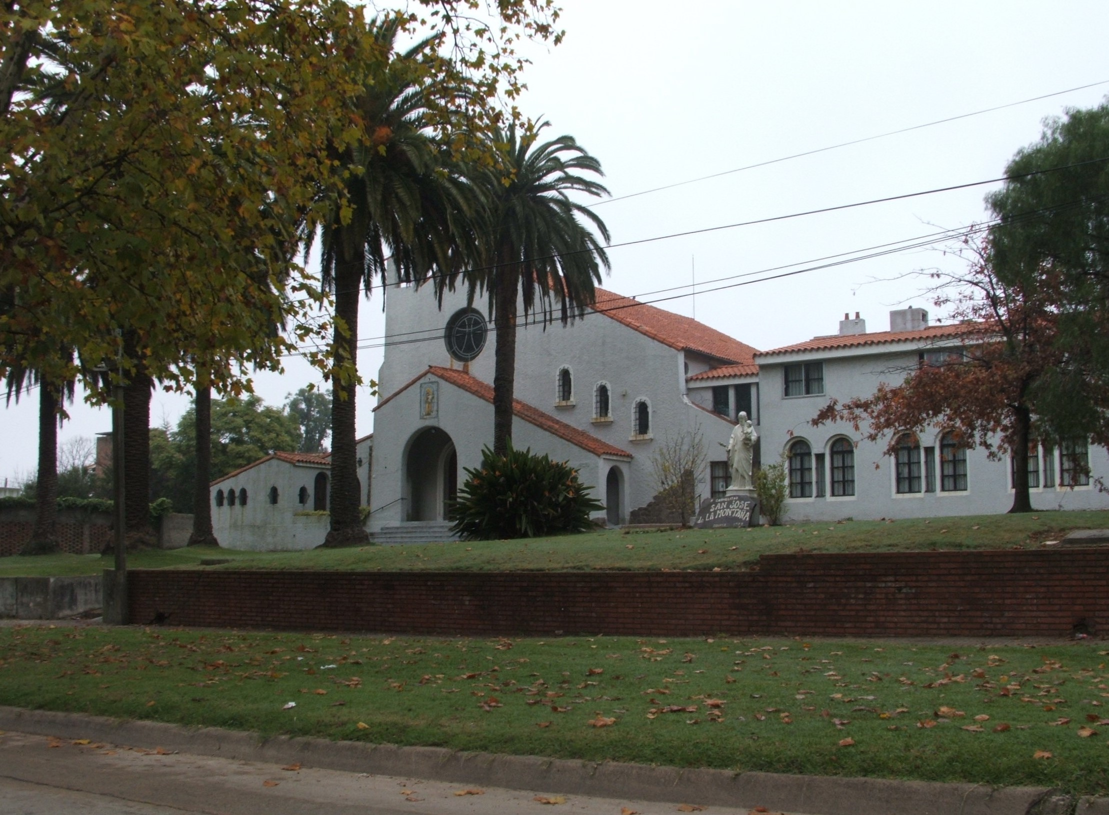 Capilla y Centro de Espiritualidad San José de la Montaña, Cooper 2263, Carrasco Norte, Montevideo. Congregación de los Carmelitas Descalzos (O.C.D.)